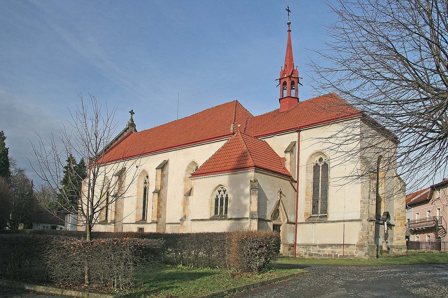 Miletín, okres Jičín. Kostel Zvěstování Panny Marie.